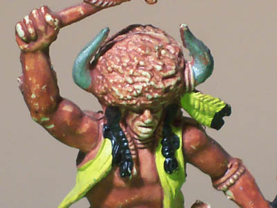 Einstellungsgröße nah